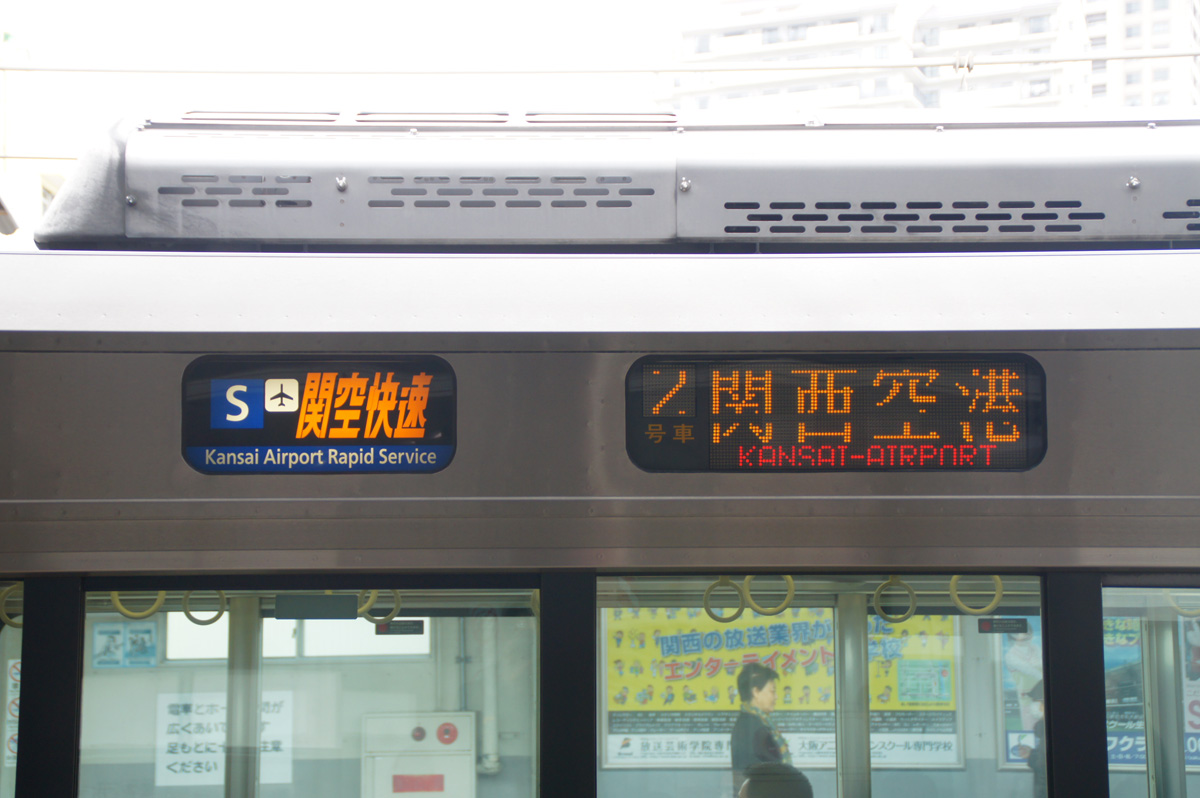 関空快速種別幕（路線記号対応）